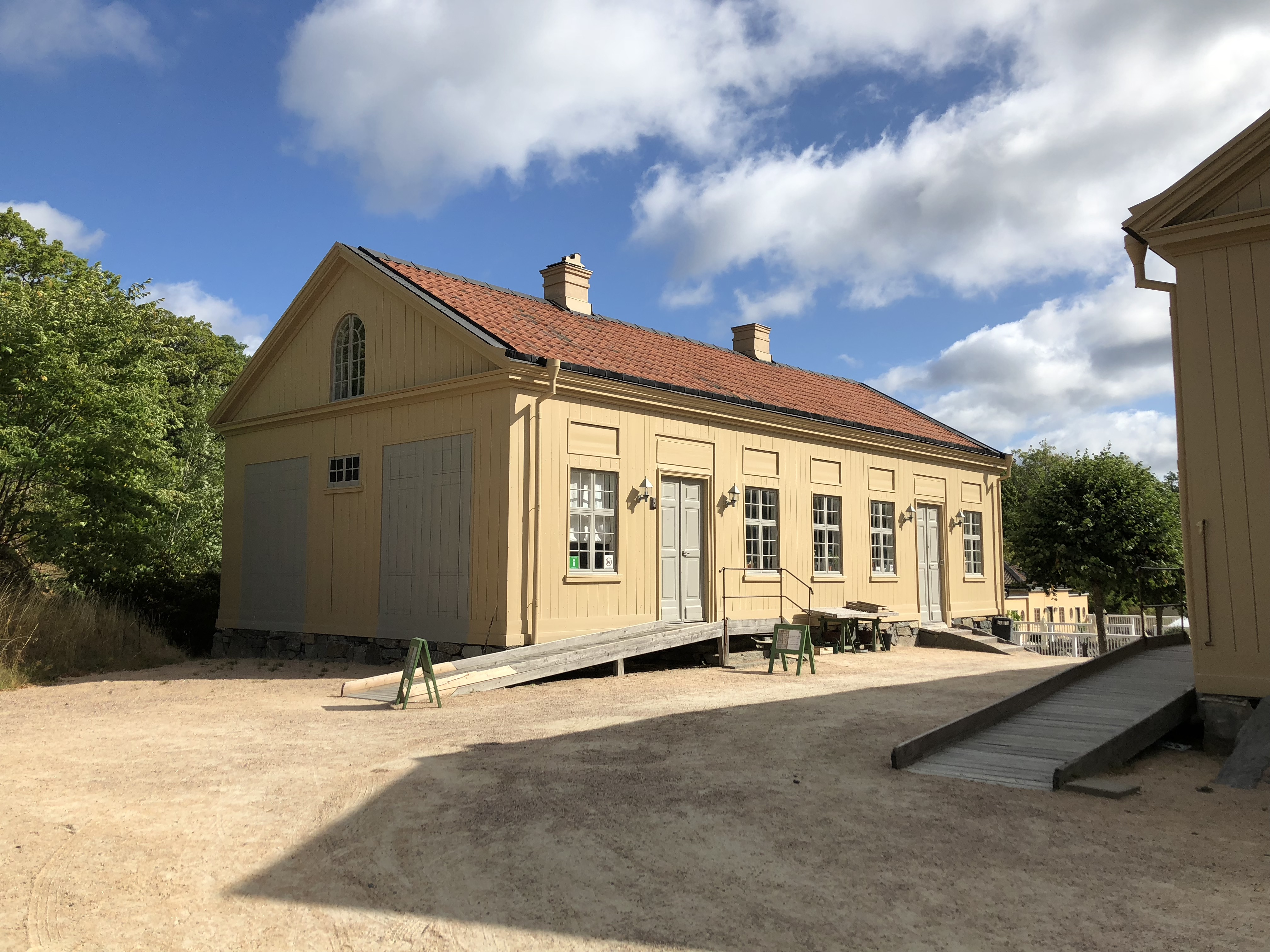 Gunnebo slotts norra flygel